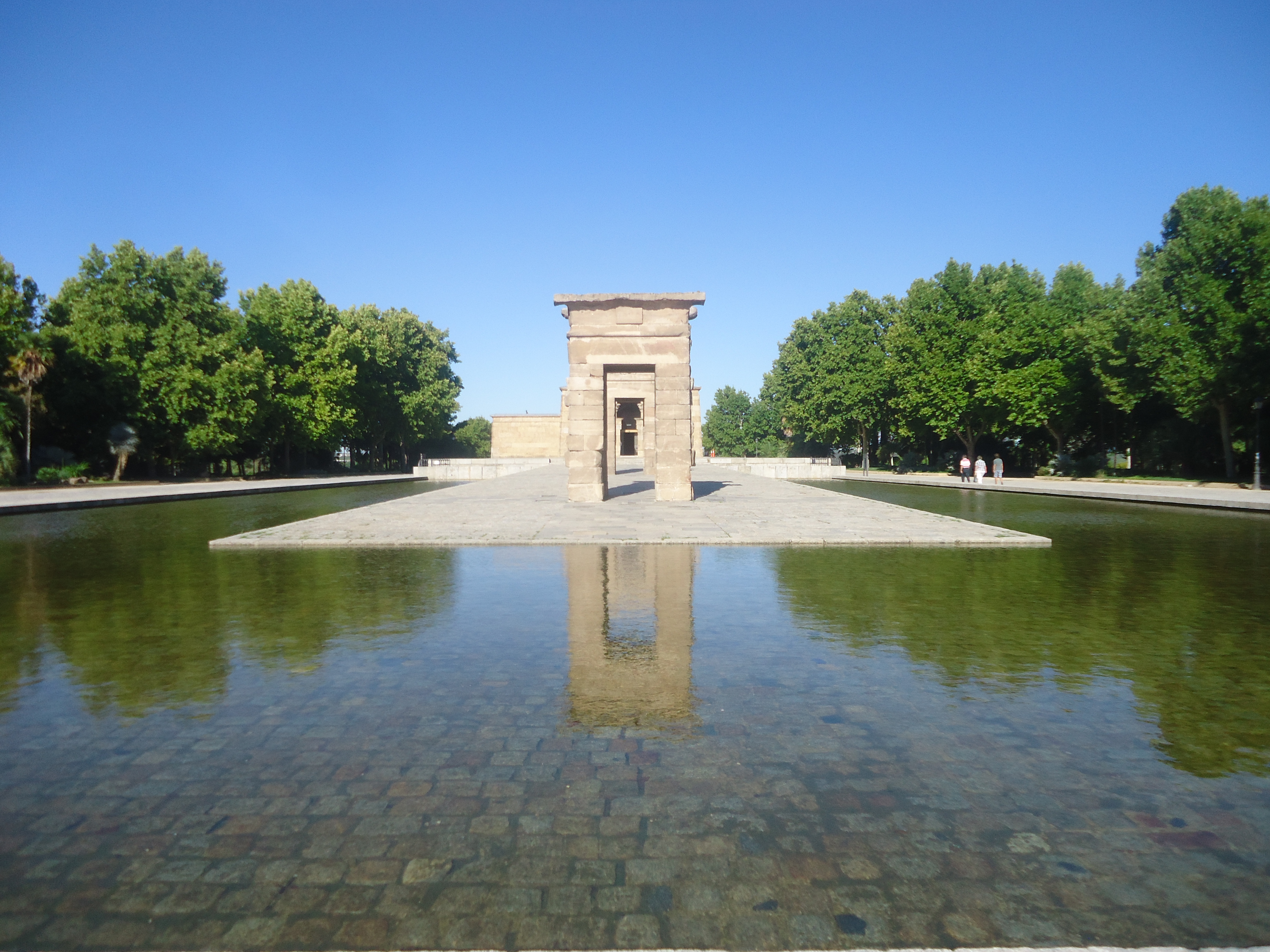 Tempel von Debod in Madrid von vorne gesehen